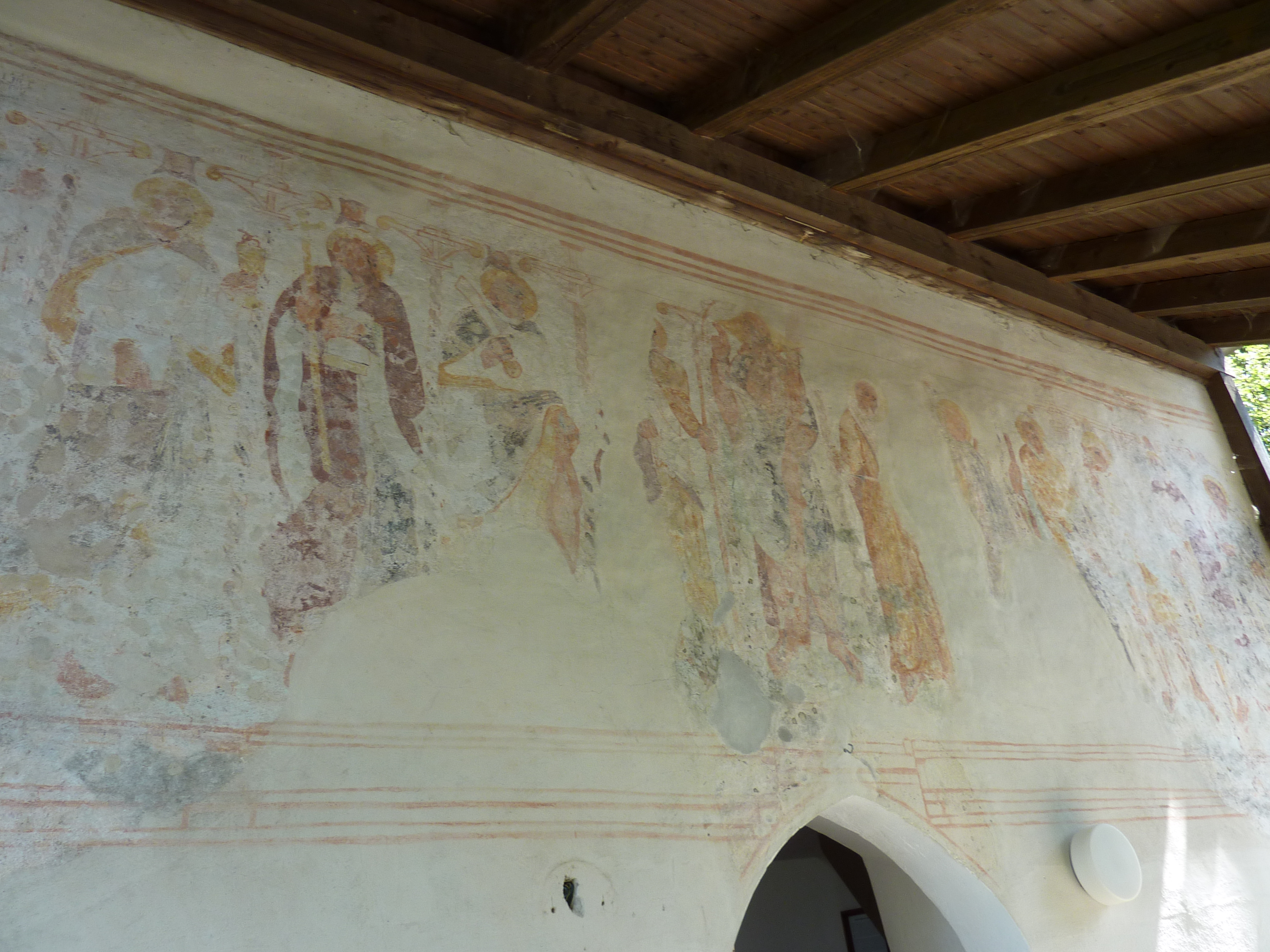 Freskenreste über dem Eingang der Imberger Kapelle